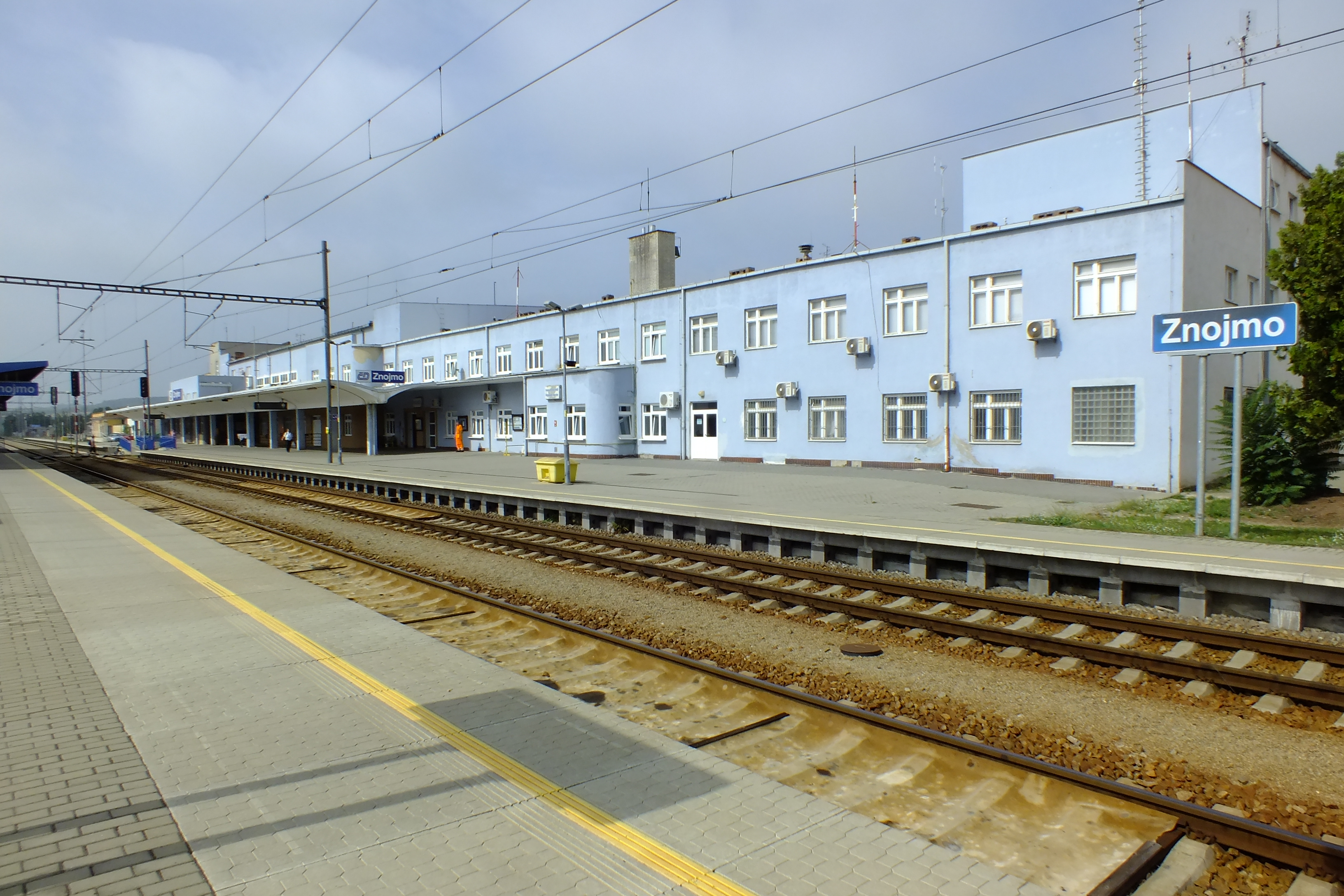 Staniční budova